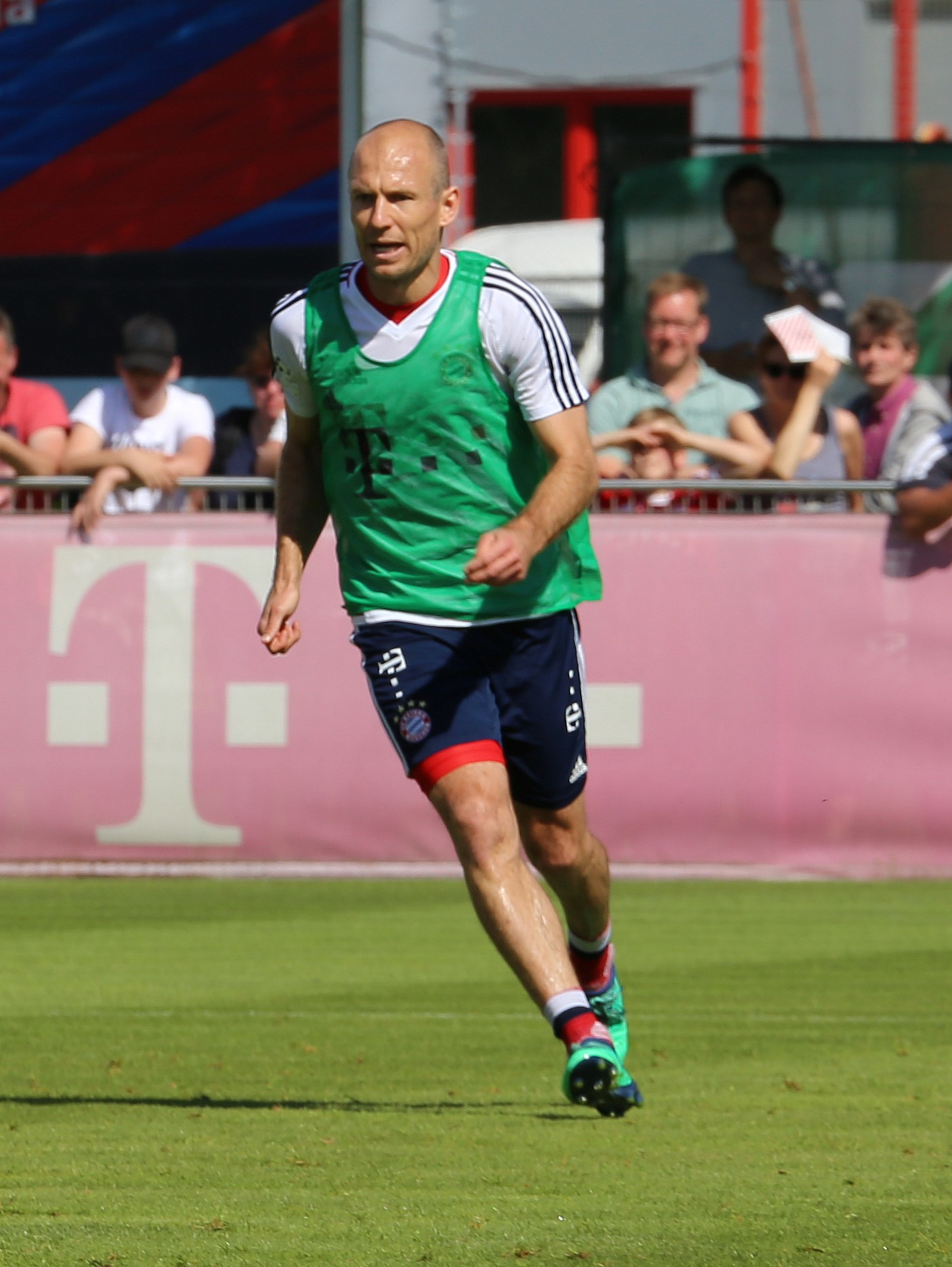 Arjen Robben, am 8. Mai 2018 beim Training auf dem Gelände des FC Bayern München